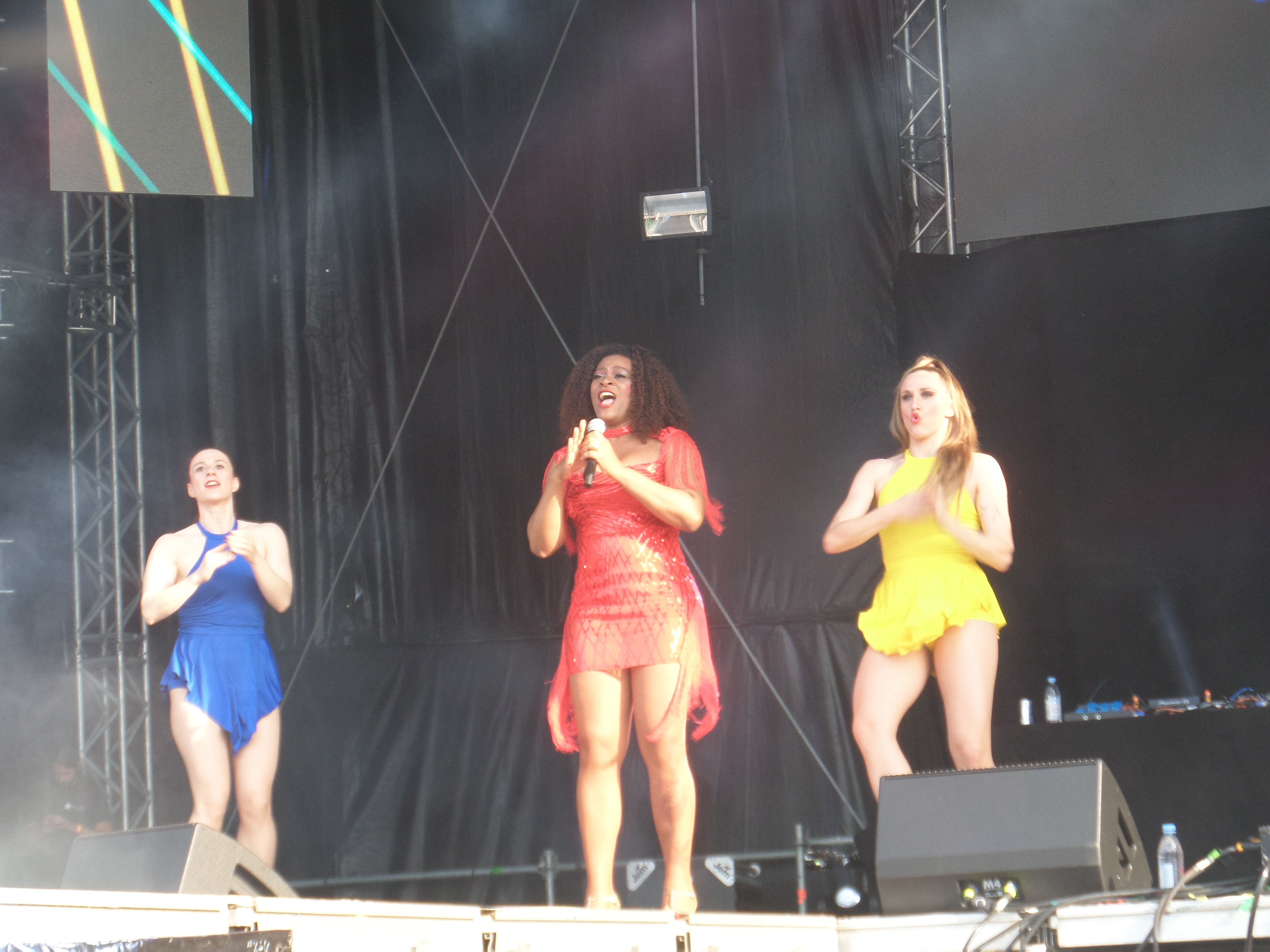 Bellini bei 90er Live in Vechta